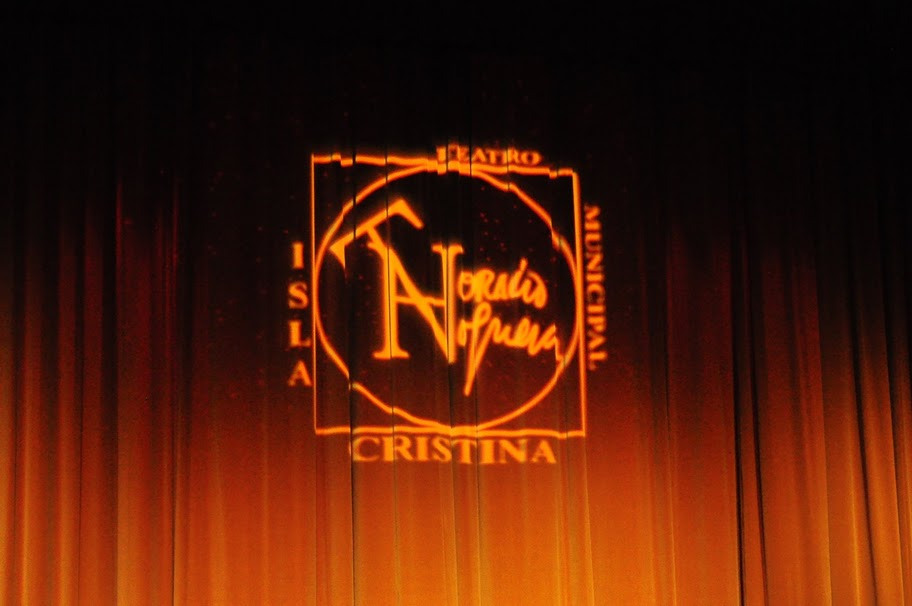 Telón del teatro del Carnaval, Horacio Noguera, en el Centro Cultural Juan Bautista Rubio Zamorano, Isla Cristina.